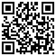 Cod QR care conţine adresa web a variantei mobile a Wikipedia în limba română (